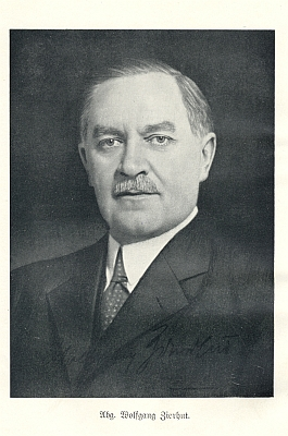 Sudetoněmecký politik Wolfgang Zierhut